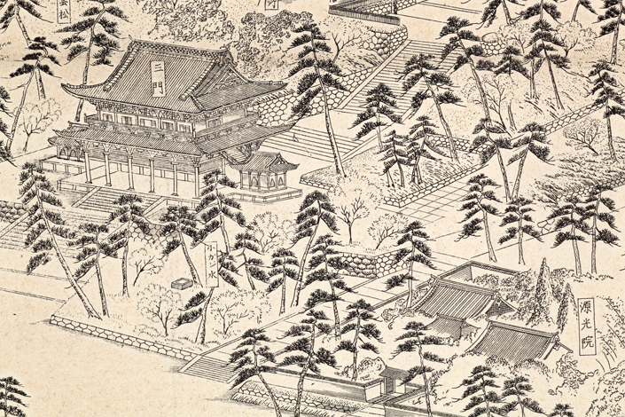 佛教大学・史料集